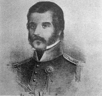 hermano menor de Fructuoso Rivera